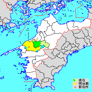 에히메현 기타군의 위치